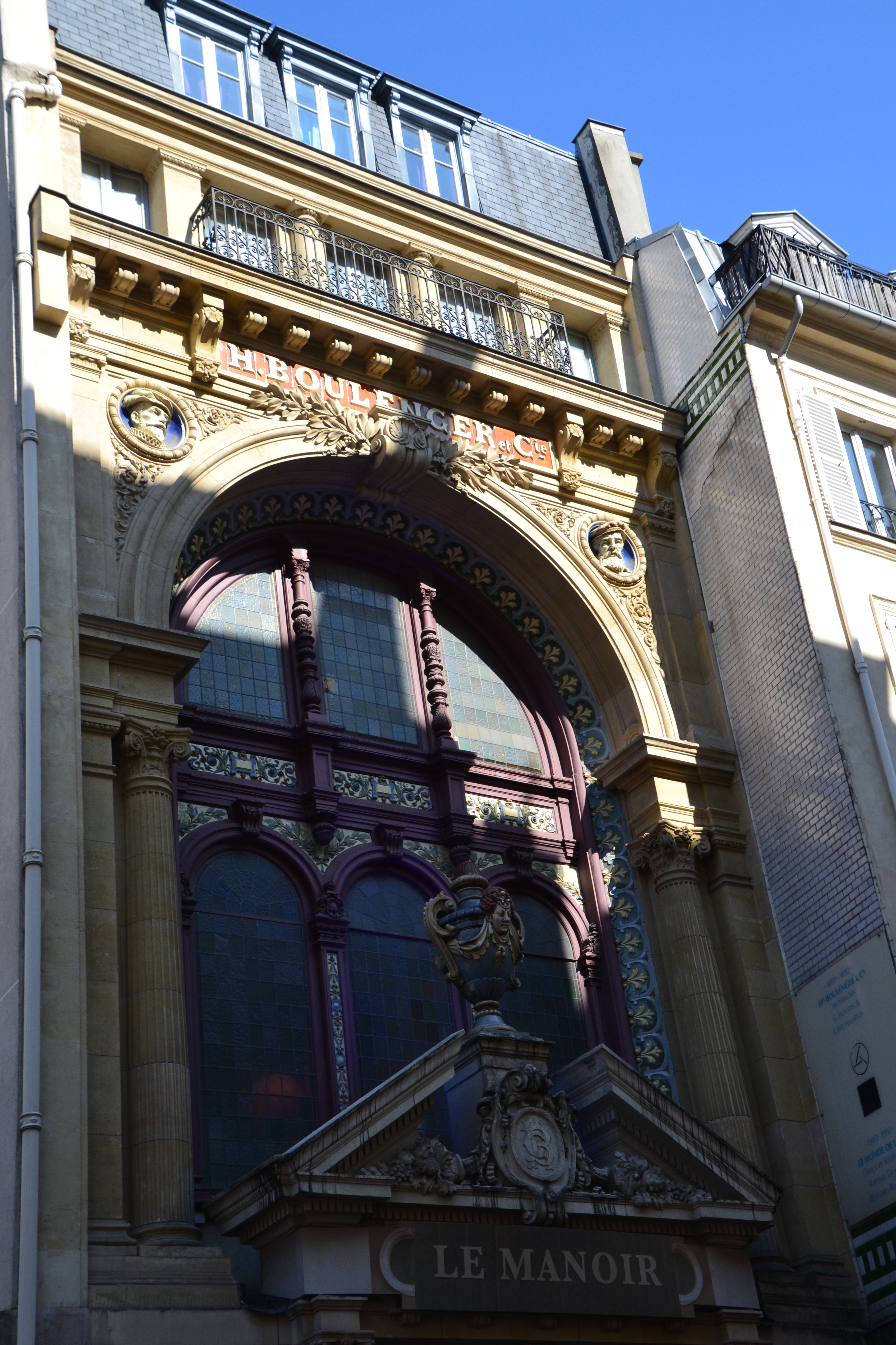 H. Boulenger & Cie - le Manoir, Paris 9e, rue de Paradis. Ancien siège social d'une fabrique de faïence, le lieu est devenu "le Manoir de Paris", une demeure hantée.